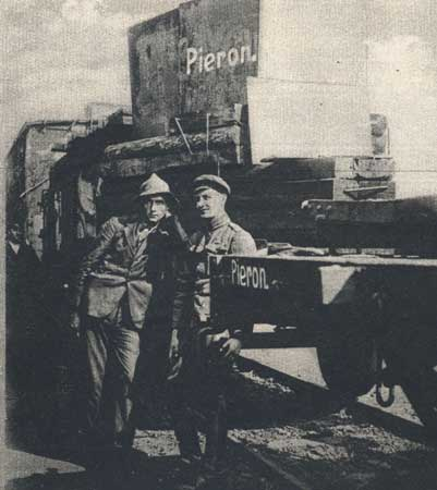 Pociąg pancerny (III powstanie śląskie)